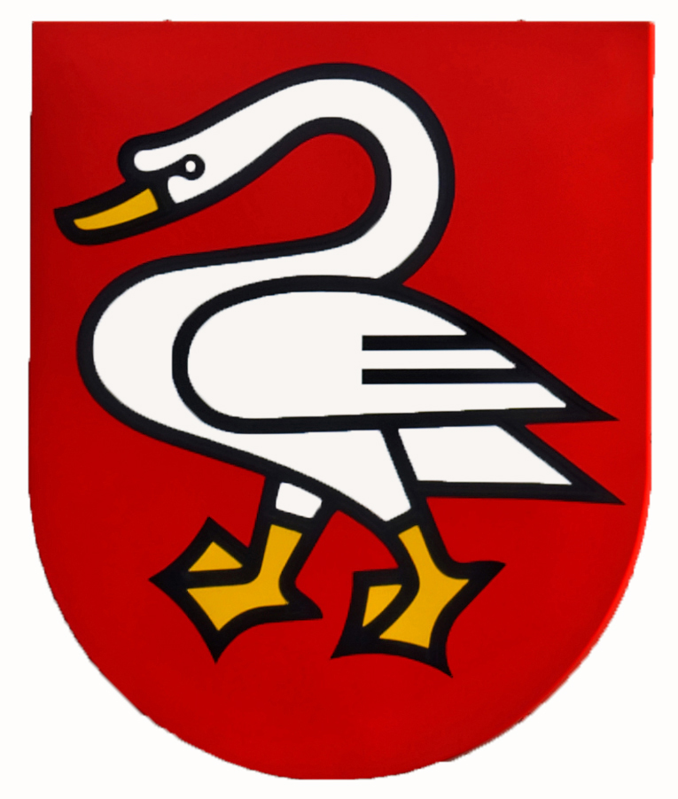 Seit der 1000-Jahrfeier 1952 verwendet die Gemeinde Horgen eine grafisch einfacher gestaltete, moderne Zeichnung des Schwans, entworfen vom einheimischen Grafiker Josef Wieser. (Paul Kläui, Geschichte der Gemeinde Horgen. Im Auftrag der Chronikkommission Horgen auf die 1000-Jahrfeier. Horgen 1952. Neues Wappen auf den Seiten 681 - 682). Dieses Bild stellt das Wappen einer schweizerischen Körperschaft des öffentlichen Rechts dar. Amtliche Werke wie Wappen sind gemeinfrei.